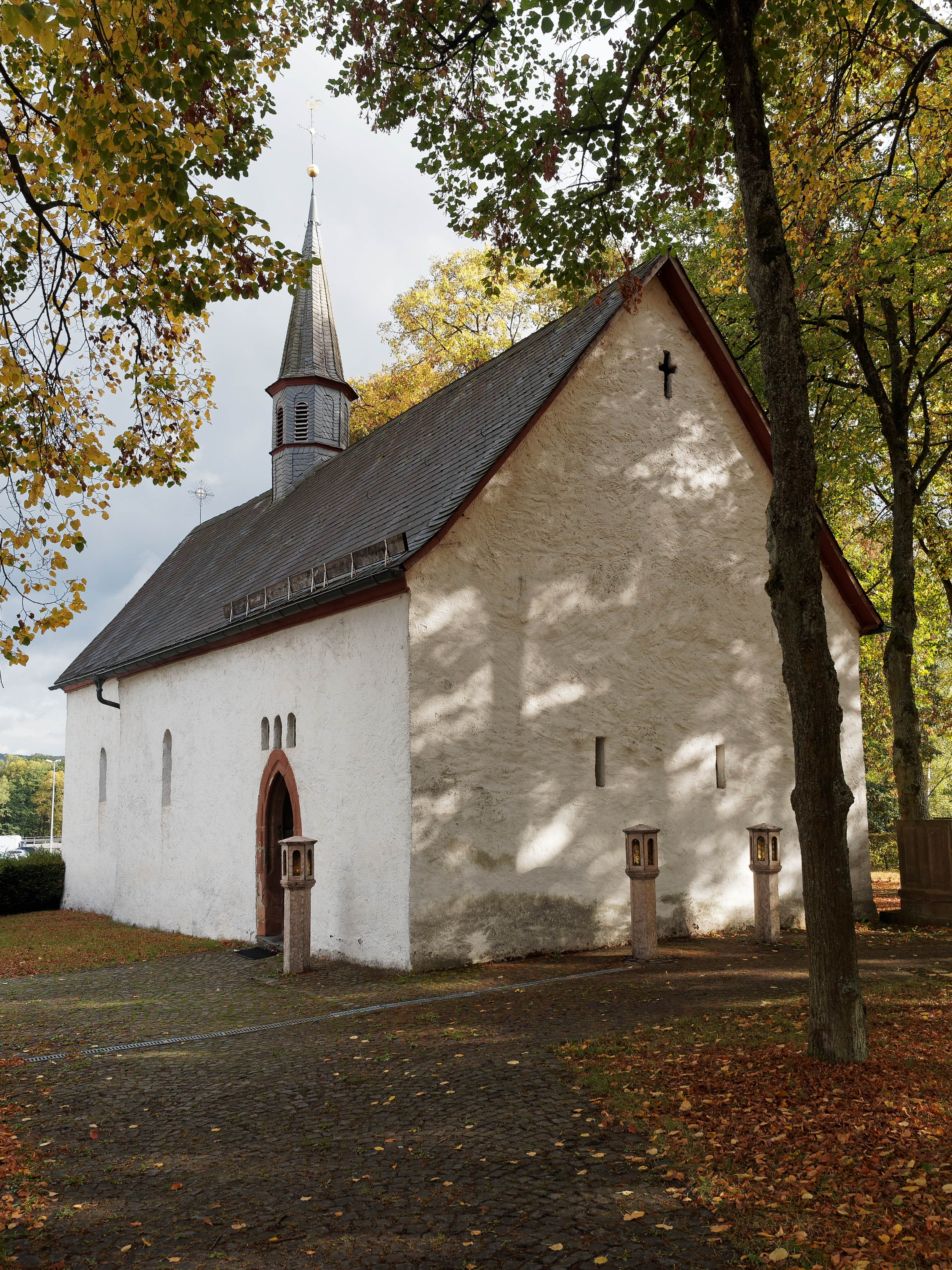 Die Wallfahrtskirche Mariä Himmelfahrt in Hallenberg, Sauerland, auch: Merklinghauser Kapelle This is a photograph of an architectural monument.